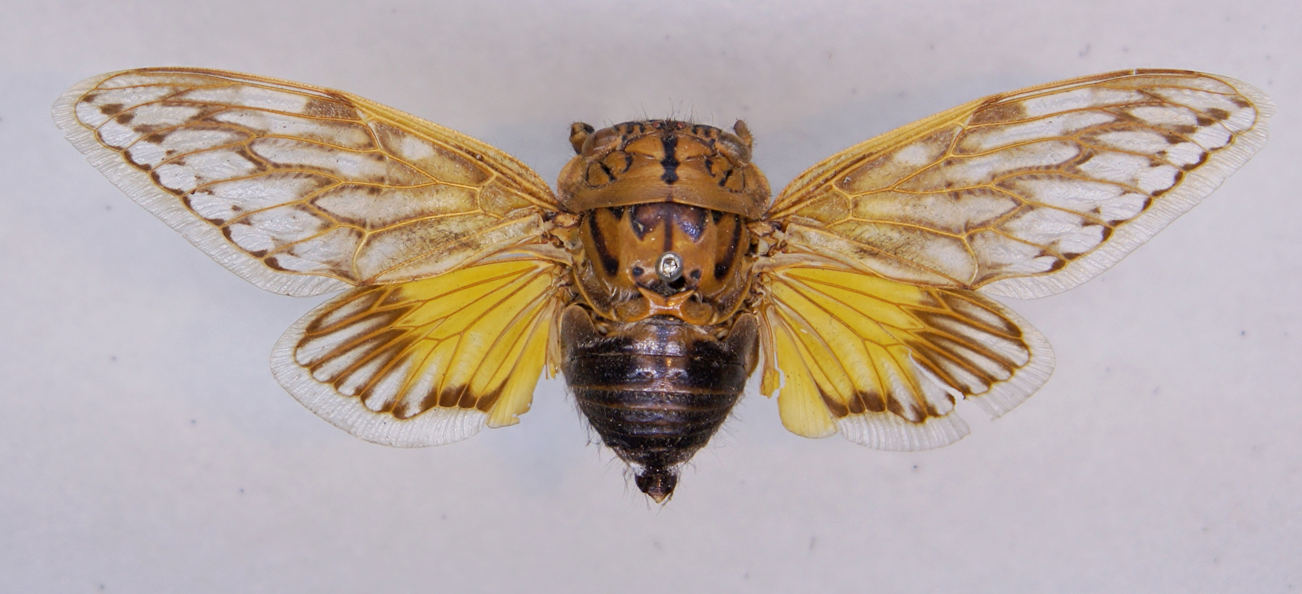 Platypleura stridula (Linné, 1758)